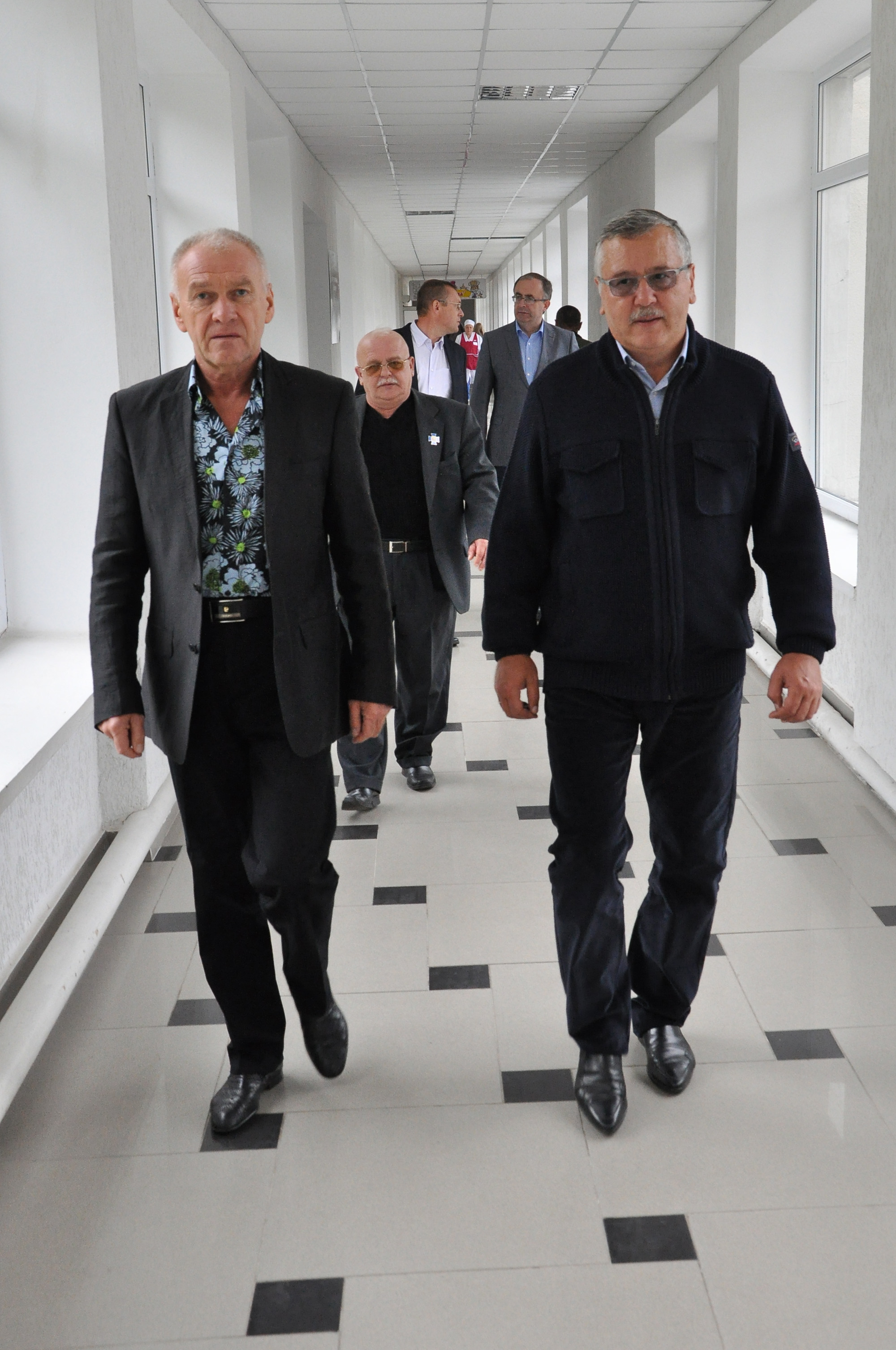 Візит Анатолія Гриценка до Тернопільської обласної комунальної клінічної психоневрологічної лікарні. Володимир Шкробот і Анатолій Гриценко.